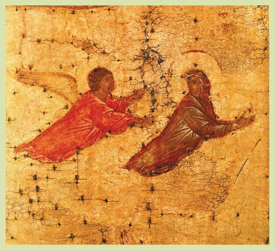 Дионисий. Распятие из Павло-Обнорского монастыря. 1500 г. ГТГ. Фрагмент